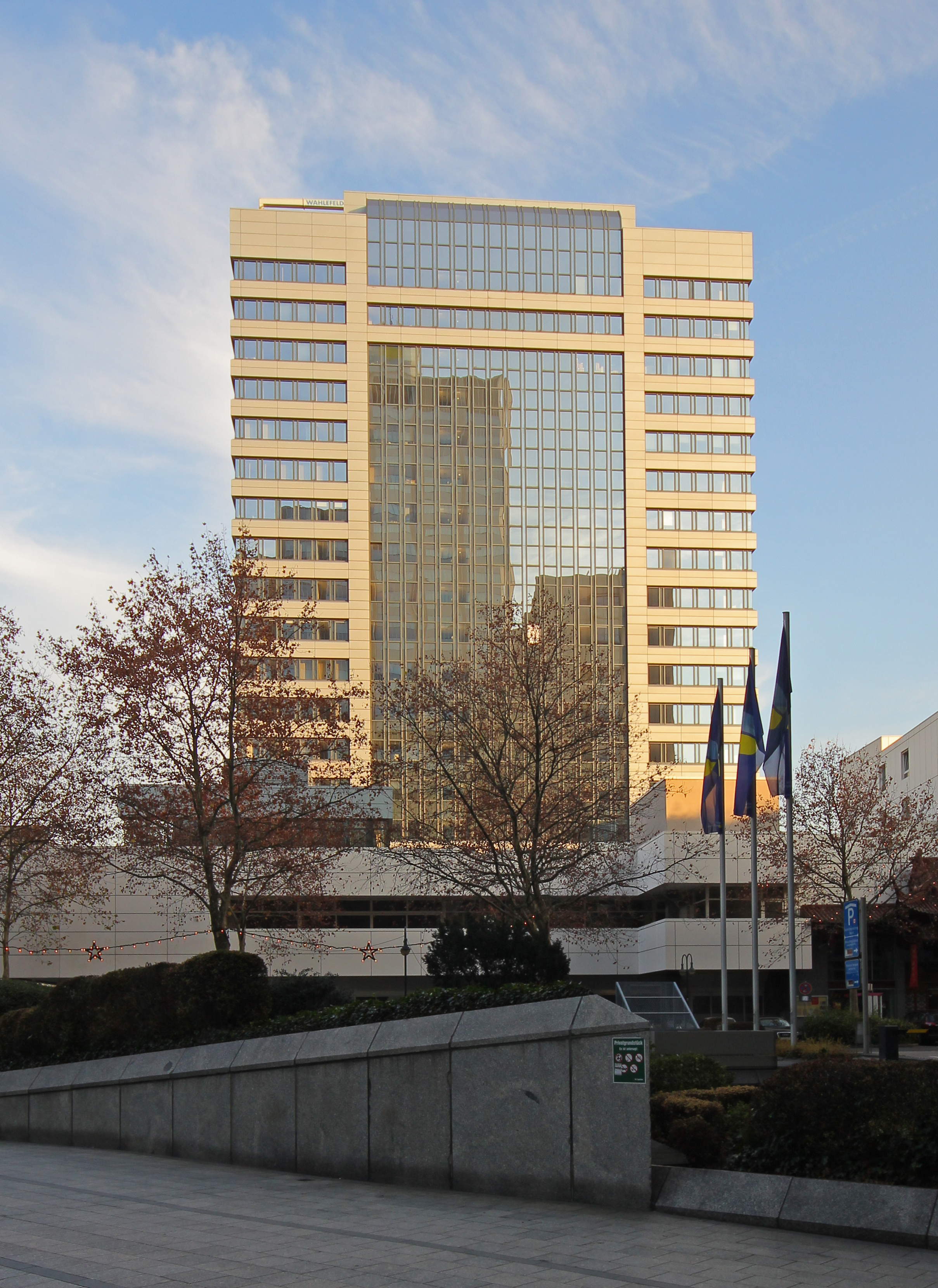 Düsseldorf-Friedrichstadt, Bürogebäude «Apollo-Hochhaus»